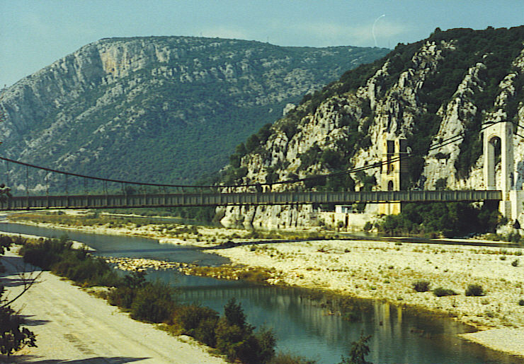 self made